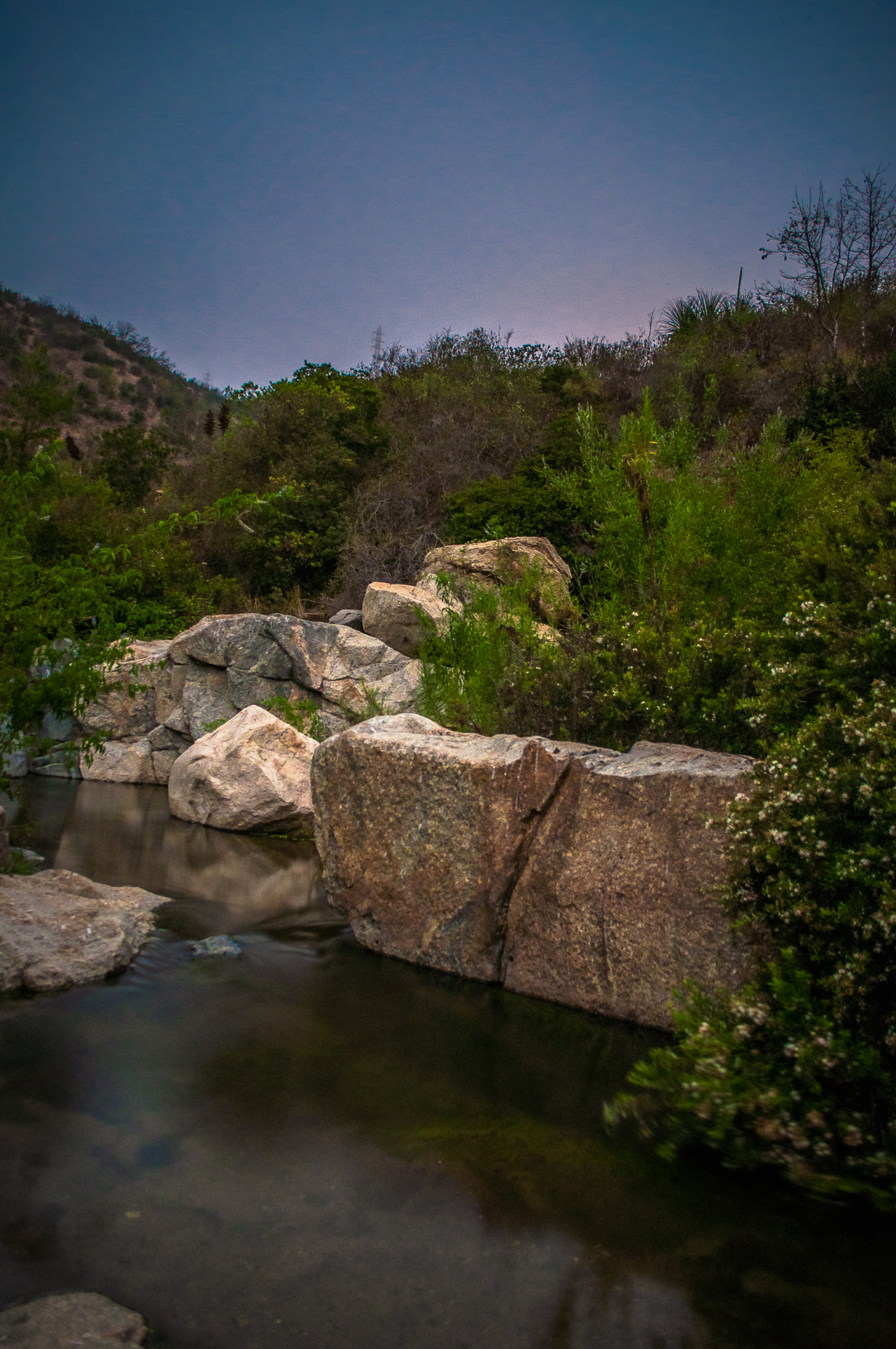 Estero de Reñaca, que fluye por las laderas rocosas en el Parque Natural Gómez Carreño, ubicado en Viña del Mar, Chile.